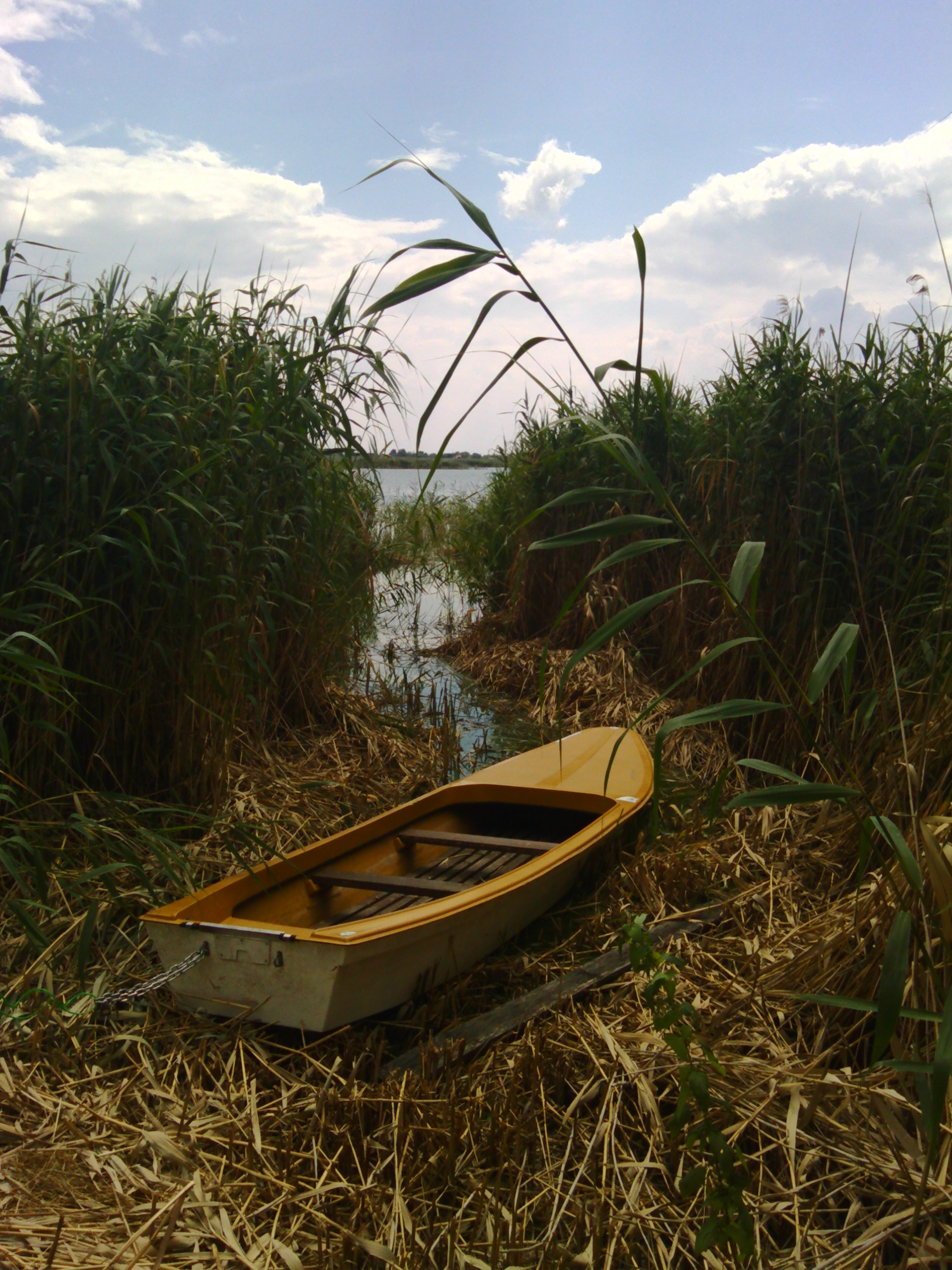 Fotografija je napravljena na Ludaškom jezeru.